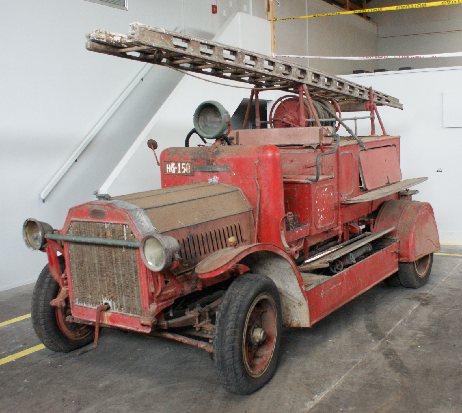 Ex. Auckland Fire Brigade